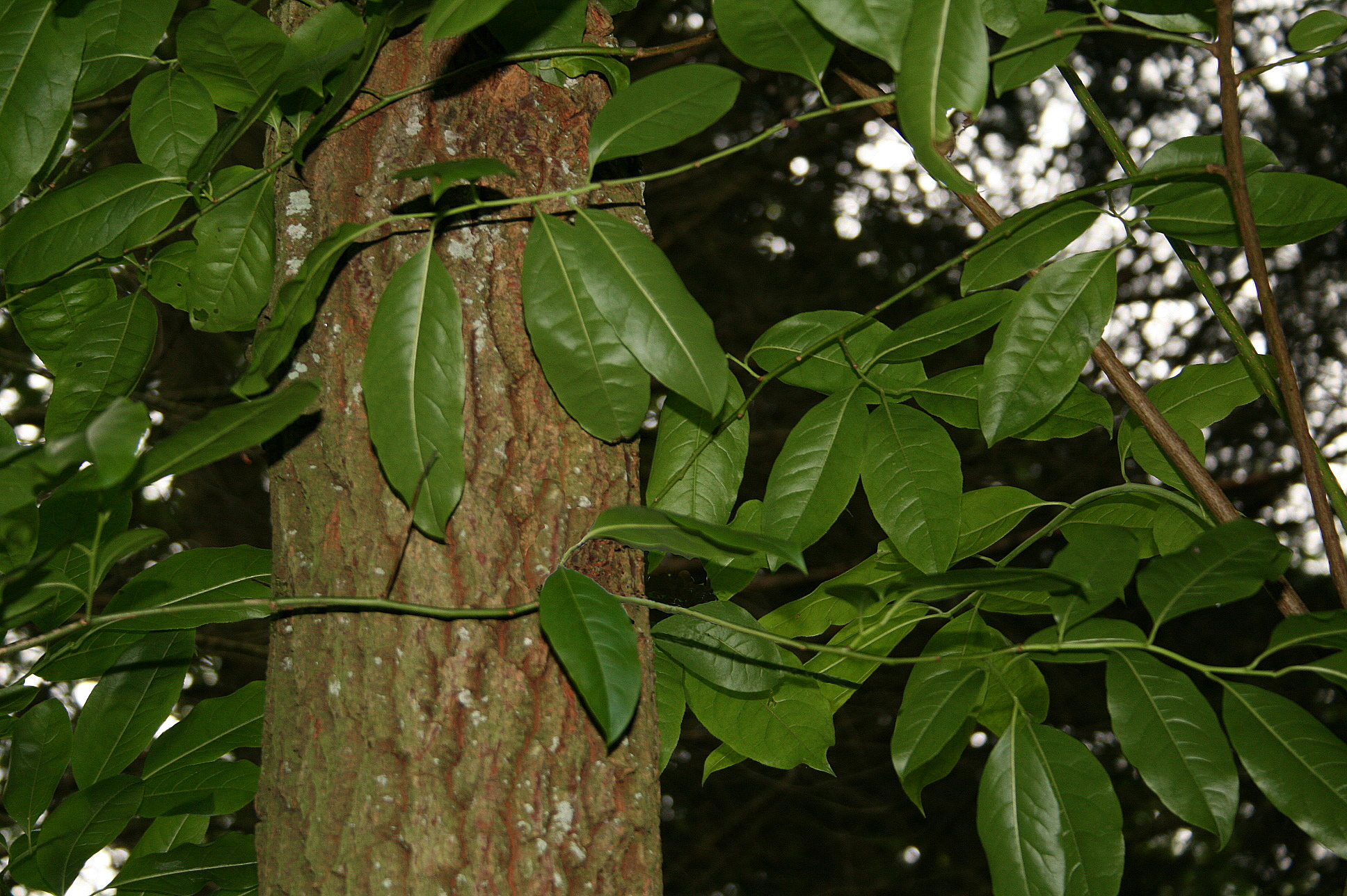 Oxydendron arboreum Position exacte : Arboretum Robert Lenoir - Rendeux (Belgique).